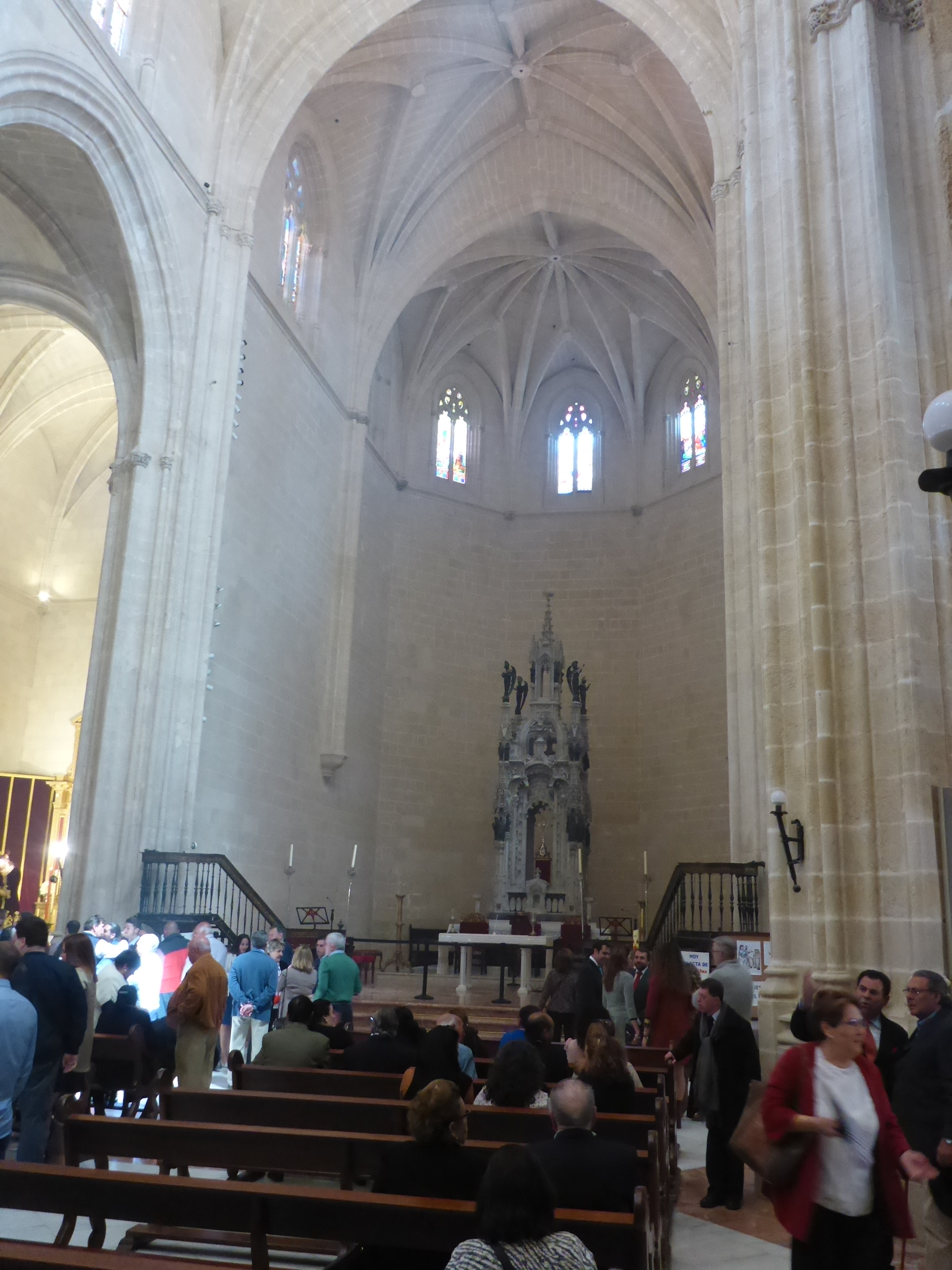 Iglesia de Santiago, buen ejemplo de Gótico jerezano. Jerez de la Frontera (España)